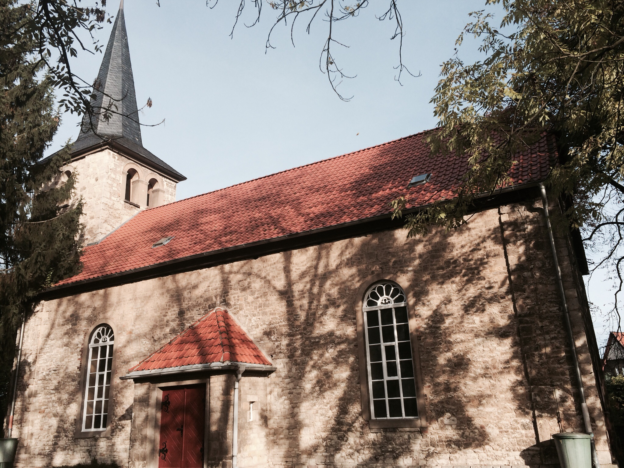 Pfarrkirche St. Martin, Nienhagen